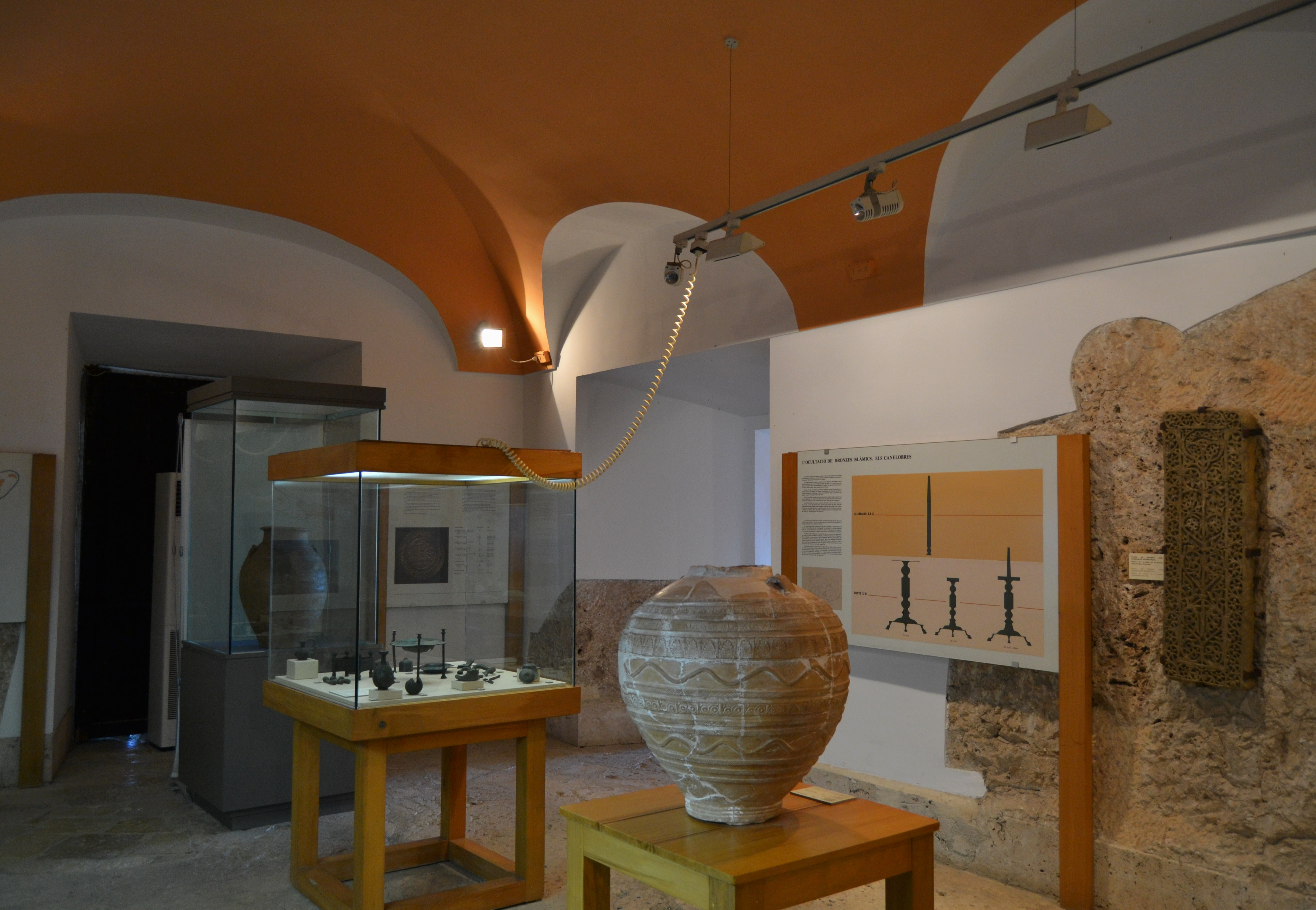 Sala del Museu Arqueològic de Dénia.